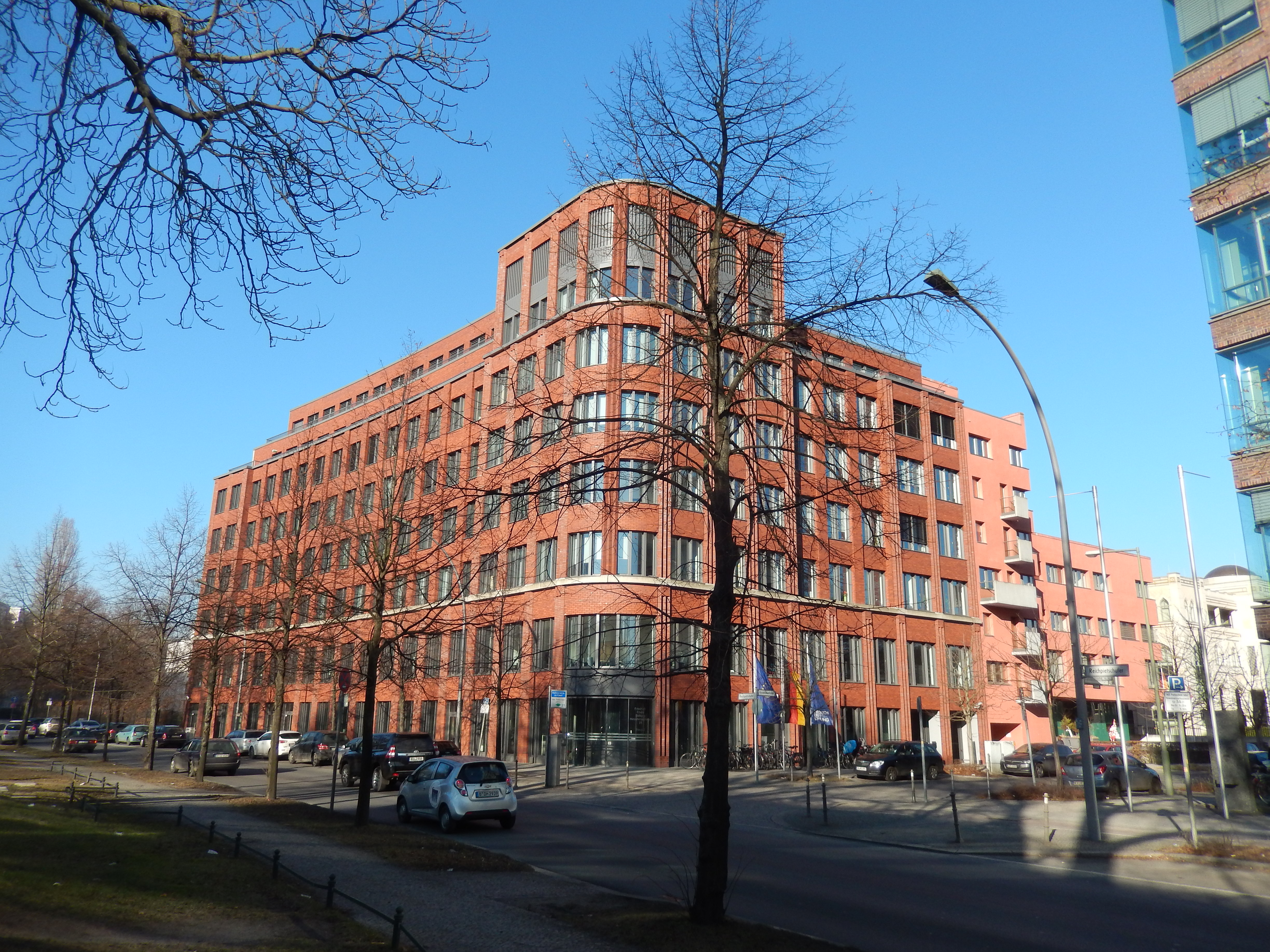 Bürogebäude Reichpietschufer Ecke Hiroshimastraße Fr.-Ebert-Stiftung